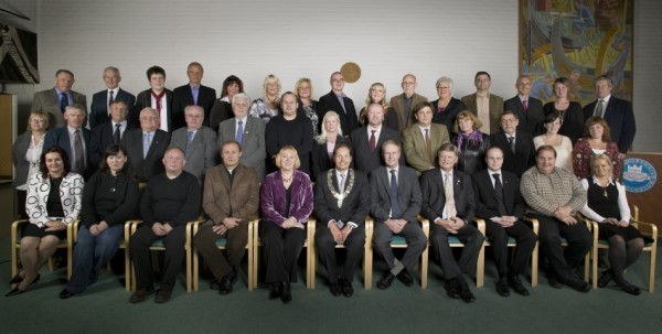 Tønsberg bystyre fra 2007 til 2011